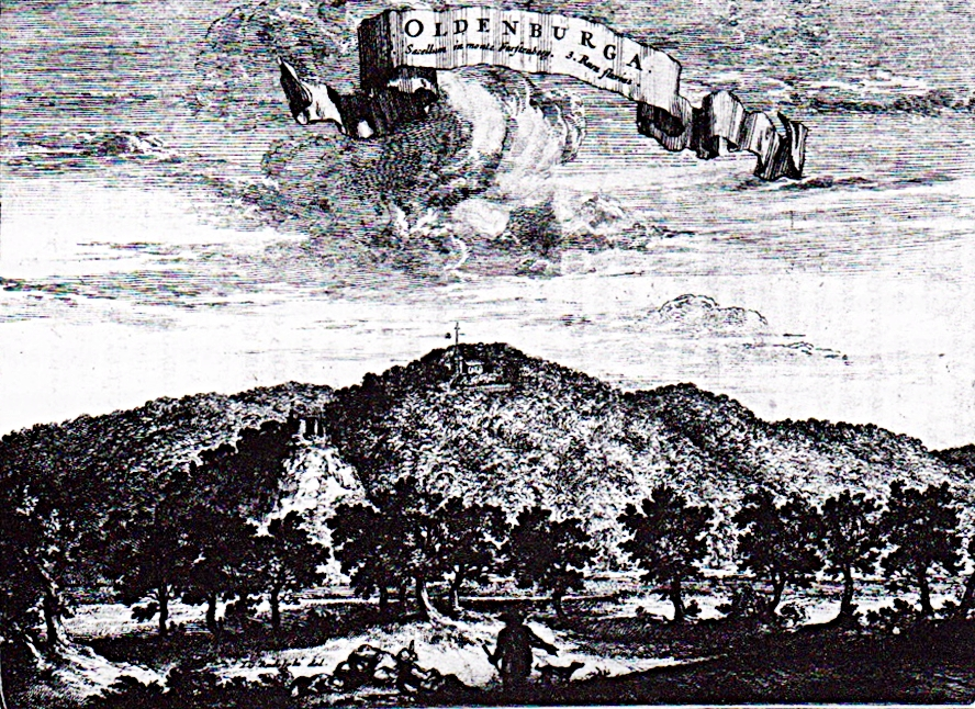 Burg Oldenburg auf dem Fürstenberg